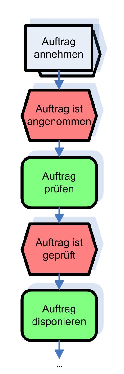 Beispiel: Ereignisorientierte Prozesskette (EPK)